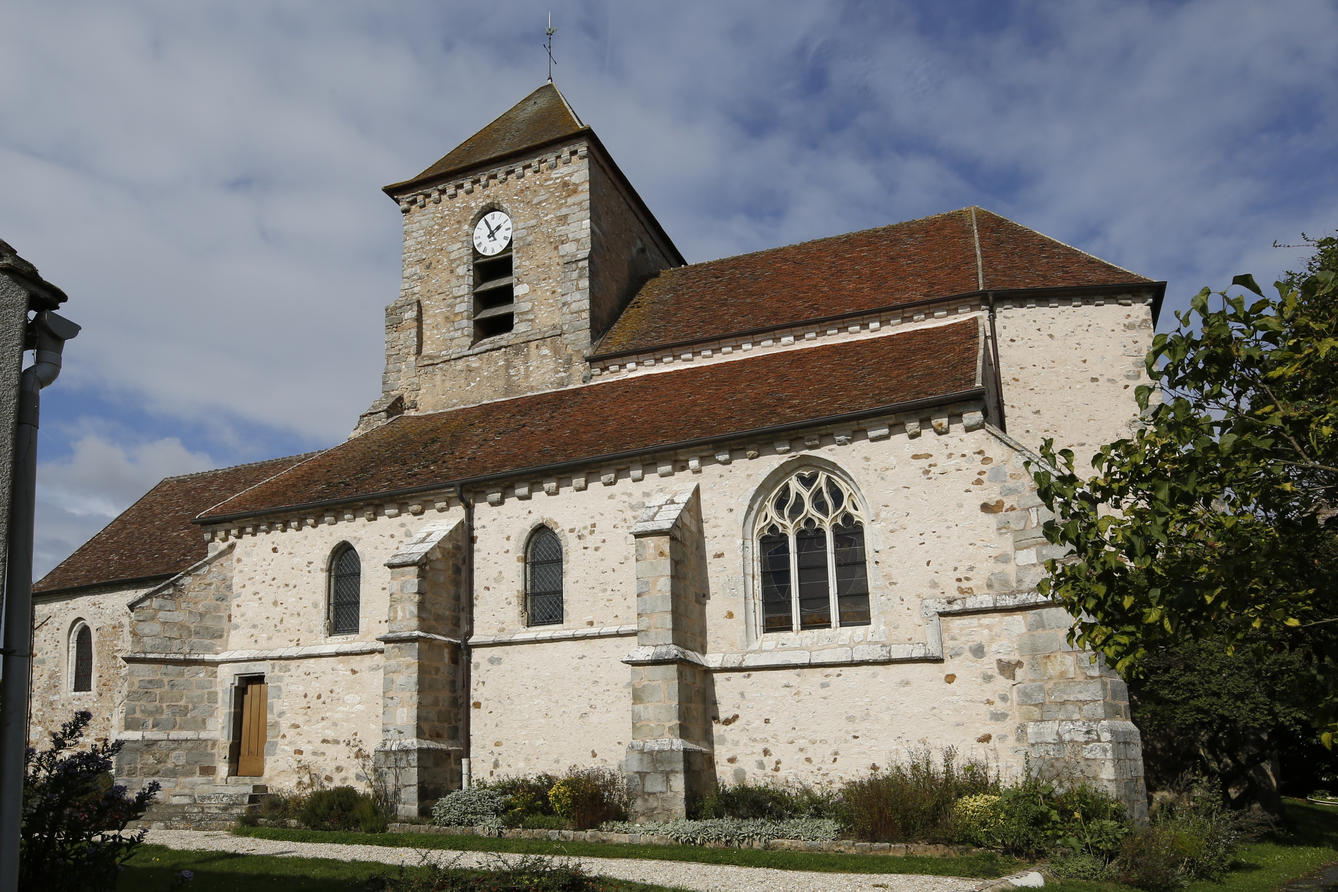 Église Saint-Germain de Montceaux-lès-Provins.